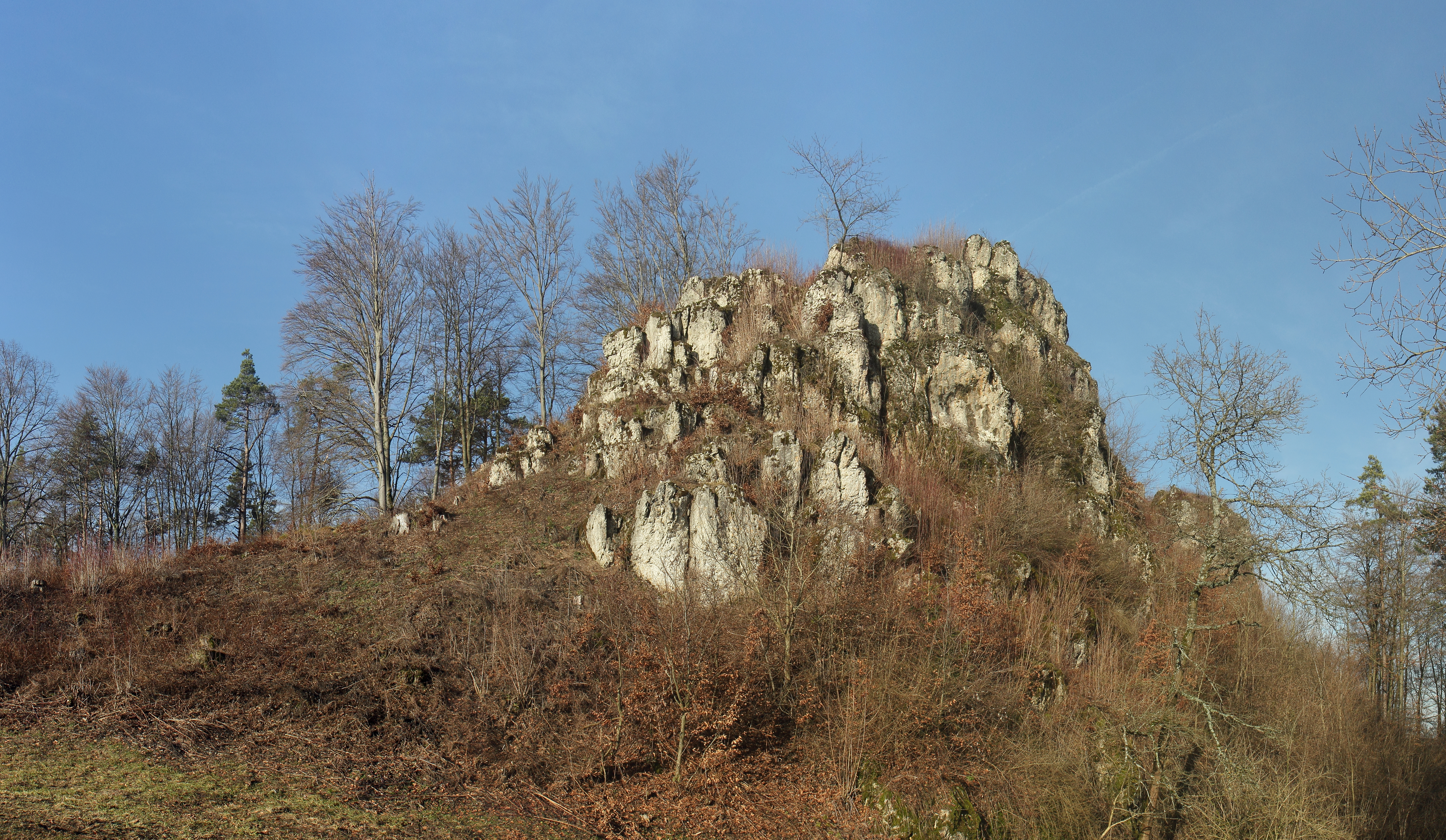 Burgstall Spies - Ansicht der Burgfelsen aus östlicher Richtung